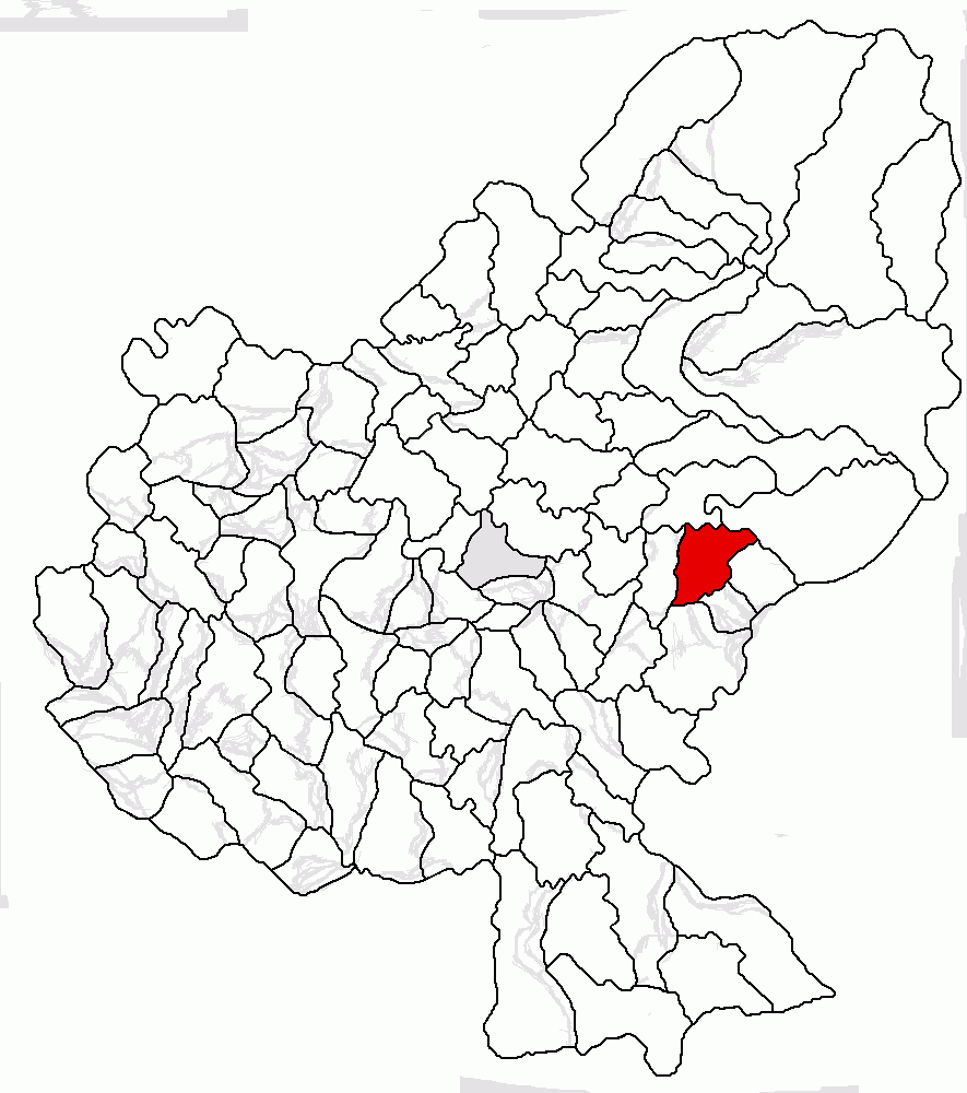 Categorie:Hărţi ale judeţului Mureş